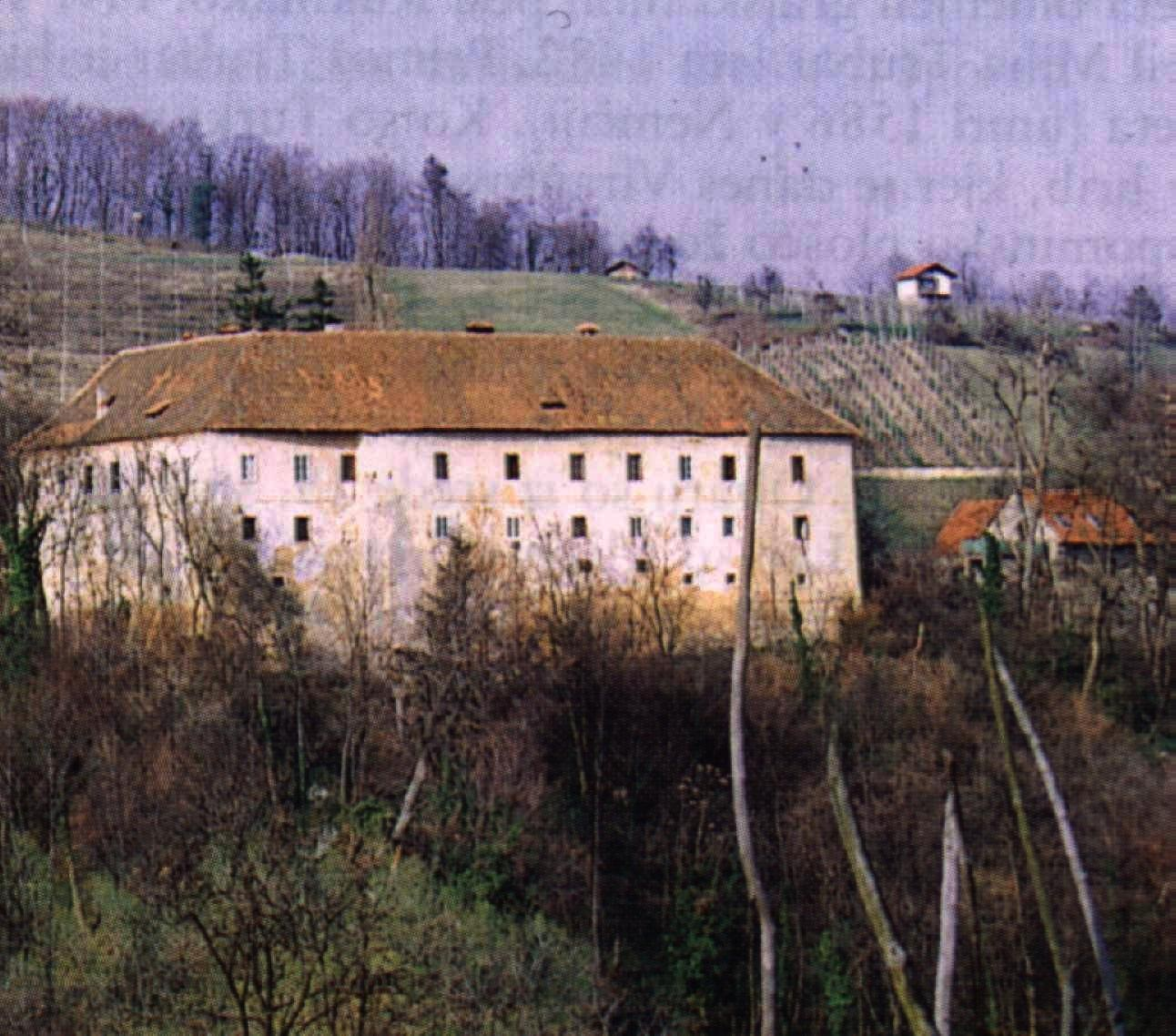 razglednica 1995